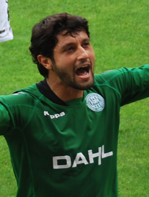 Fodboldspilleren Eduardo Delani fra Viborg FF. Her efter 1. divisionskampen mod FC Roskilde på Viborg Stadion.